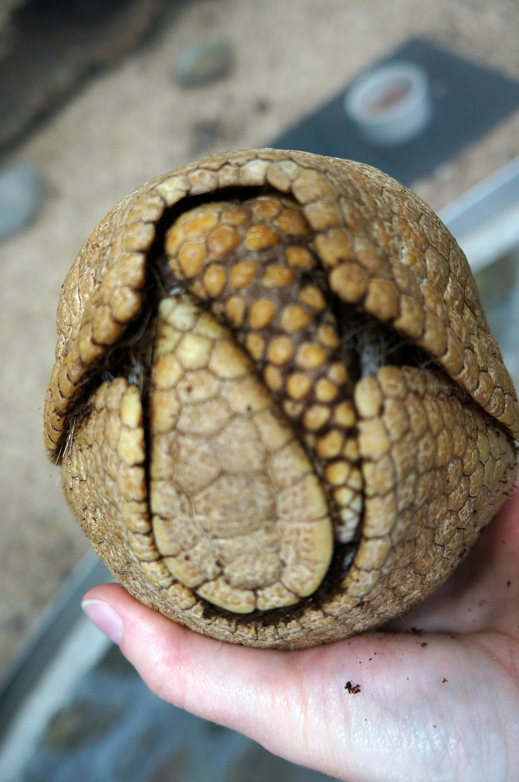 Dreibinden-Kugelgürteltier zusammengerollt, bei Zoo Zajac, Duisburg